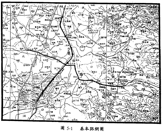 新竹捷運早期的路網規畫方案之一